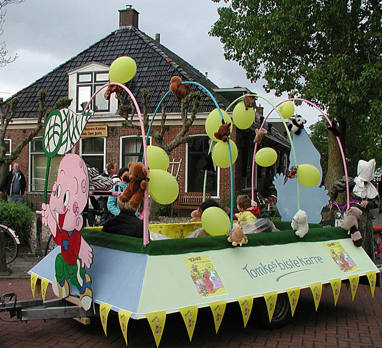 feestwein oer Tomke